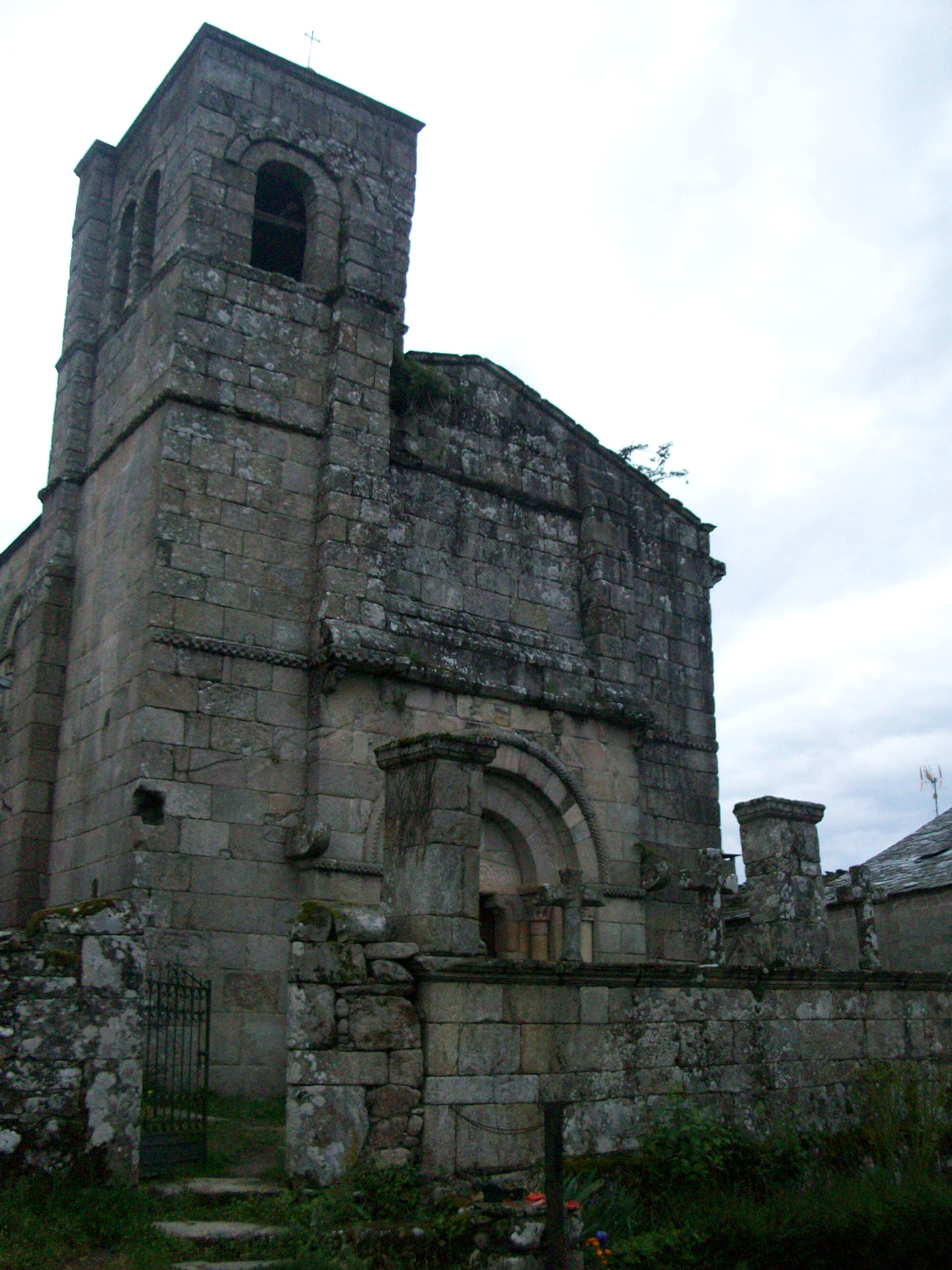 Según la guia de importancia pretérita. Románico gallego y pórtico lleno de símbolos e iconografia medieval